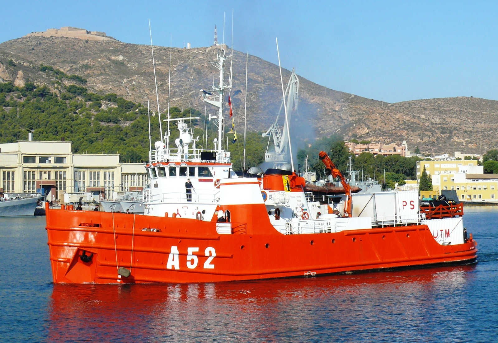 País: España Clase, [Tipo]: Circos, [ATA]. Constructor: Astilleros del Atlántico, Santander, España. Fecha alta: 30 de julio de 1981. Desplazamiento ( toneladas ): 1.437 a plena carga. Dimensiones ( metros ): 41 x 11,6 x 5,5 Propulsión: 2 x diesels AESA/Sulzer 16ASV25/30 ( 7.744 cv ). Velocidad ( nudos ): 13. Autonomía ( millas ): 27.000 a 12 nudos. Dotación: 33 ( 8 oficiales ) + 45 científicos. Cañones: 2 x 12,7mm. Capacidad de transporte: 640 tm combustibles, 100 tm agua. Indicativo: EBDG Comentario: Ex-Somiedo. En grada y botado en 1977, entregado en 1978, fue construido para la Compañía Hispano Americana de Offshore,S.A. Posteriormente fue comprado por el Ministerio de Defensa. Este barco fué diseñado para tareas de apoyo y suministro para plataformas petrolíferas, y es por ello que conserva un gran radio de acción, lo que sin duda fue determinante para su elección como buque de investigación antártica, antes de la entrada en servicio del Hespérides. El Las Palmas fue reconvertido a dichas tareas en 1988, para lo cual fue necesario reforzar su proa con planchas de 20mm y añadir un moderno sistema de comunicaciones por satélite, habilitación para 22 investigadores y estiba a popa para dos contenedores científicos. Con la entrada en servicio del Hespérides el barco fue reconvertido otra vez a su labor original como remolcador y repintado de color gris. En el año 2002 ha vuelto a ser repintado con los colores rojo y blanco tan típicos de las naves de investigación antártica, y participará en tareas de apoyo junto al Hespérides durante la presente campaña. A partir del 30 de Abril de 2004 traslada su base a Cartagena. Base: Cartagena. Unidades similares: A51 Mahón